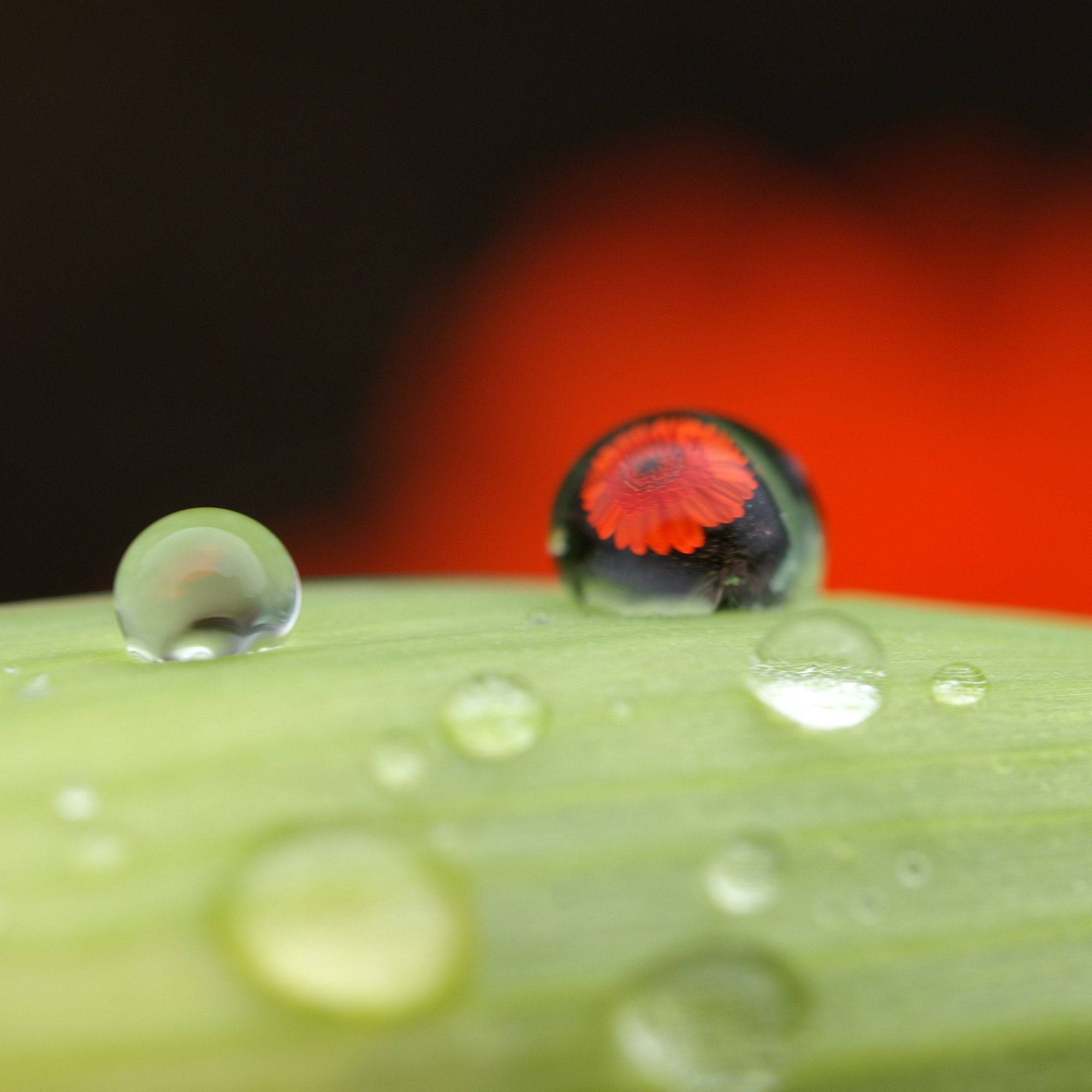 Tautropfen auf einer Gerbera.